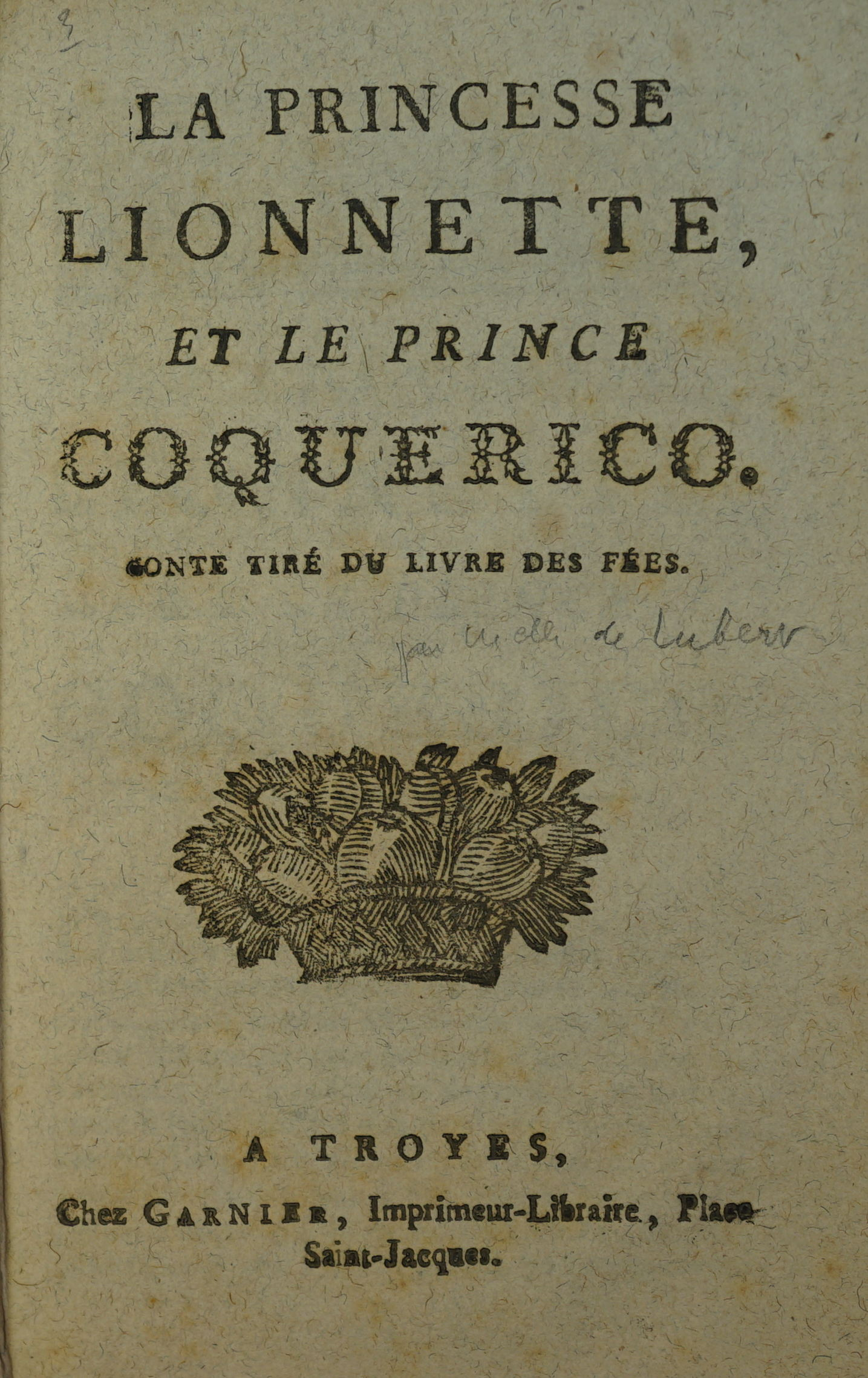 extrait du livre.